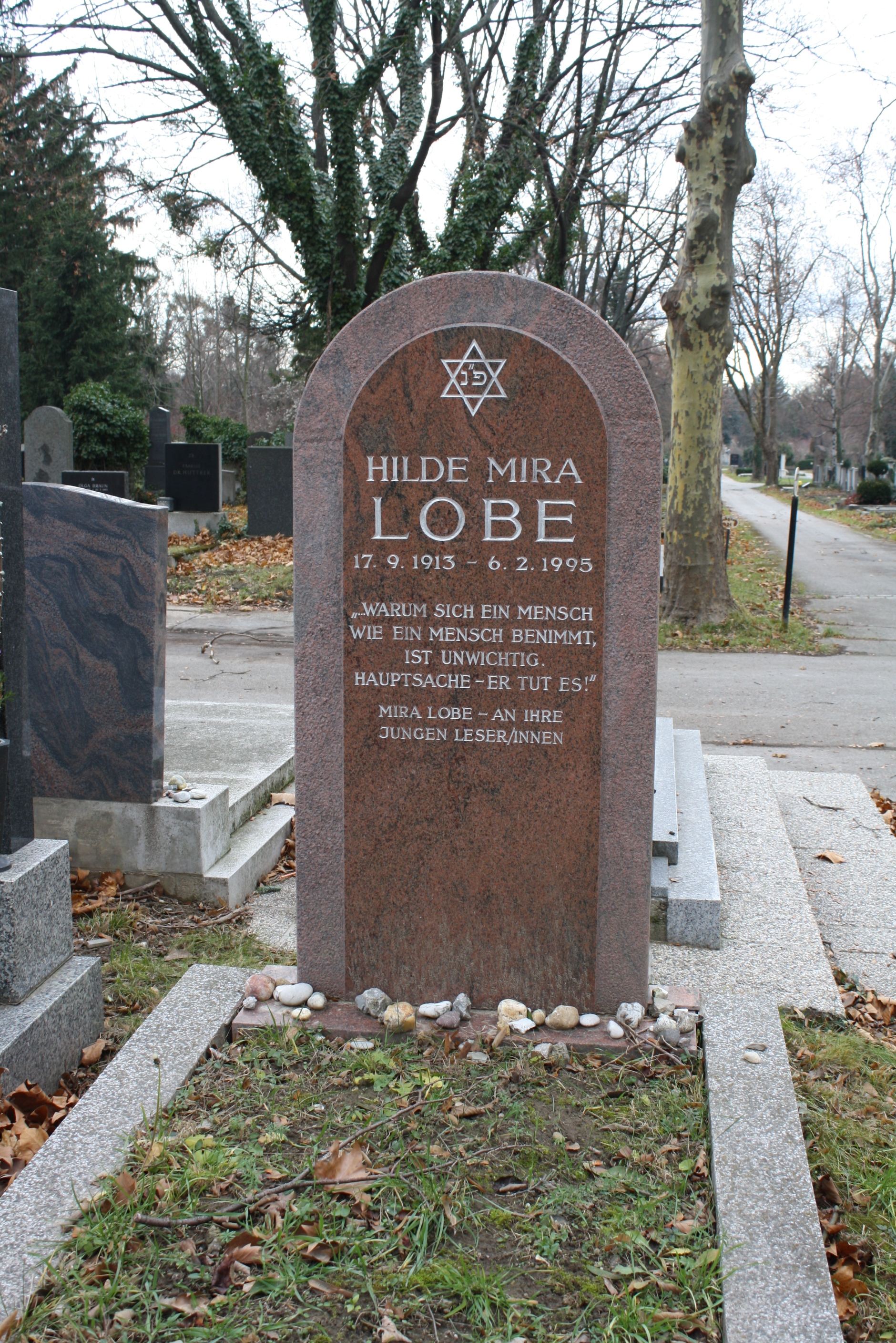 Grabstein der Kinderbuchautorin Mira Lobe auf dem Zentralfriedhof Wien, 4. Tor (neue israelitische Abteilung)